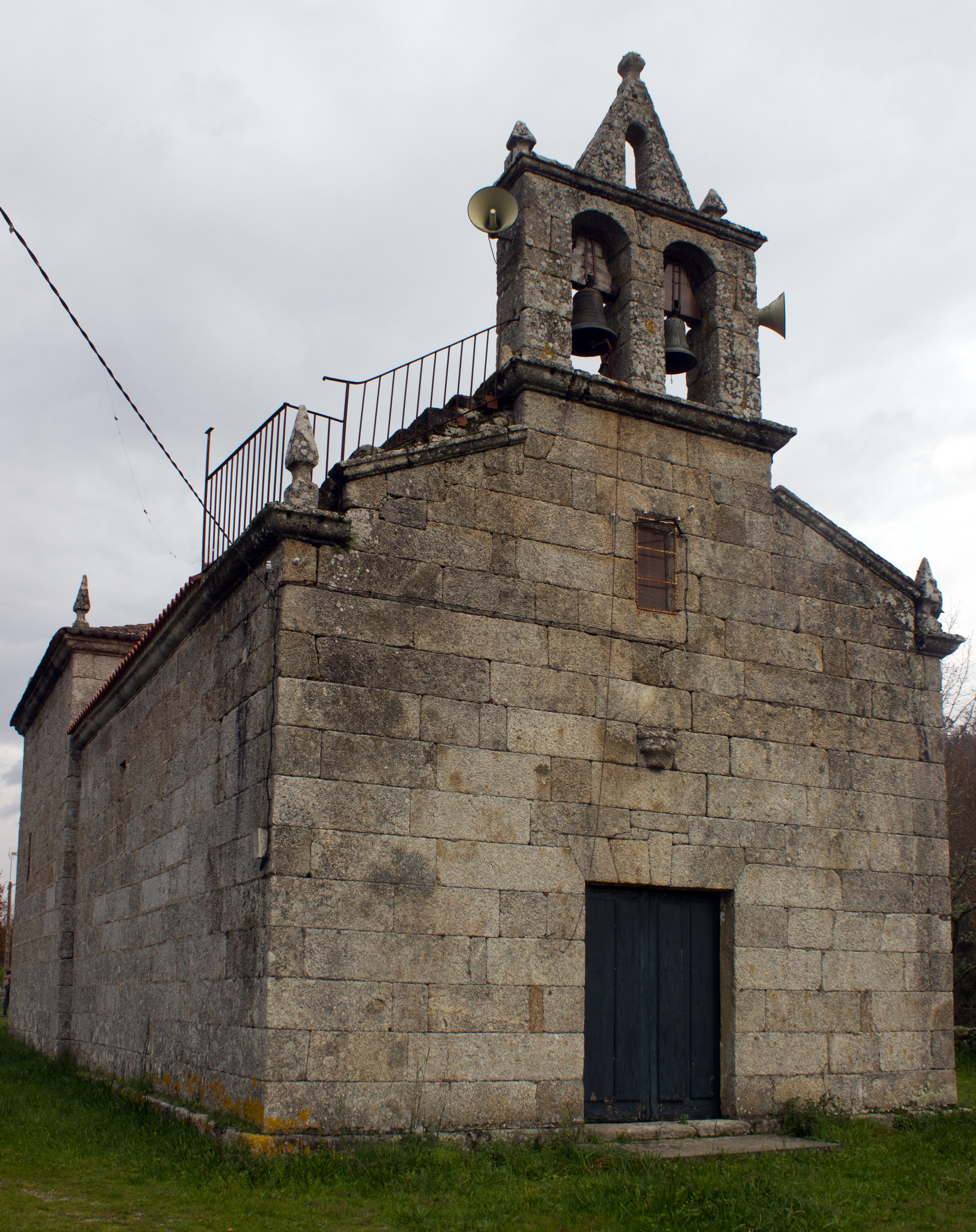 Igrexa de San Amaro das Regadas, no concello de Beade